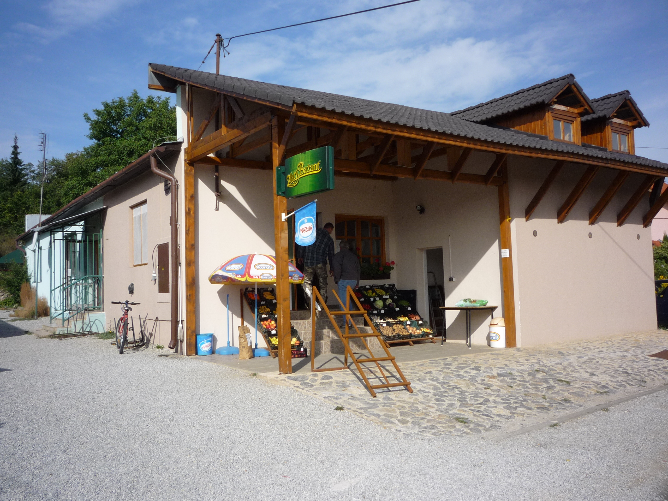 Dlhá Ves - Hosszúszó _ utcarészlet 2